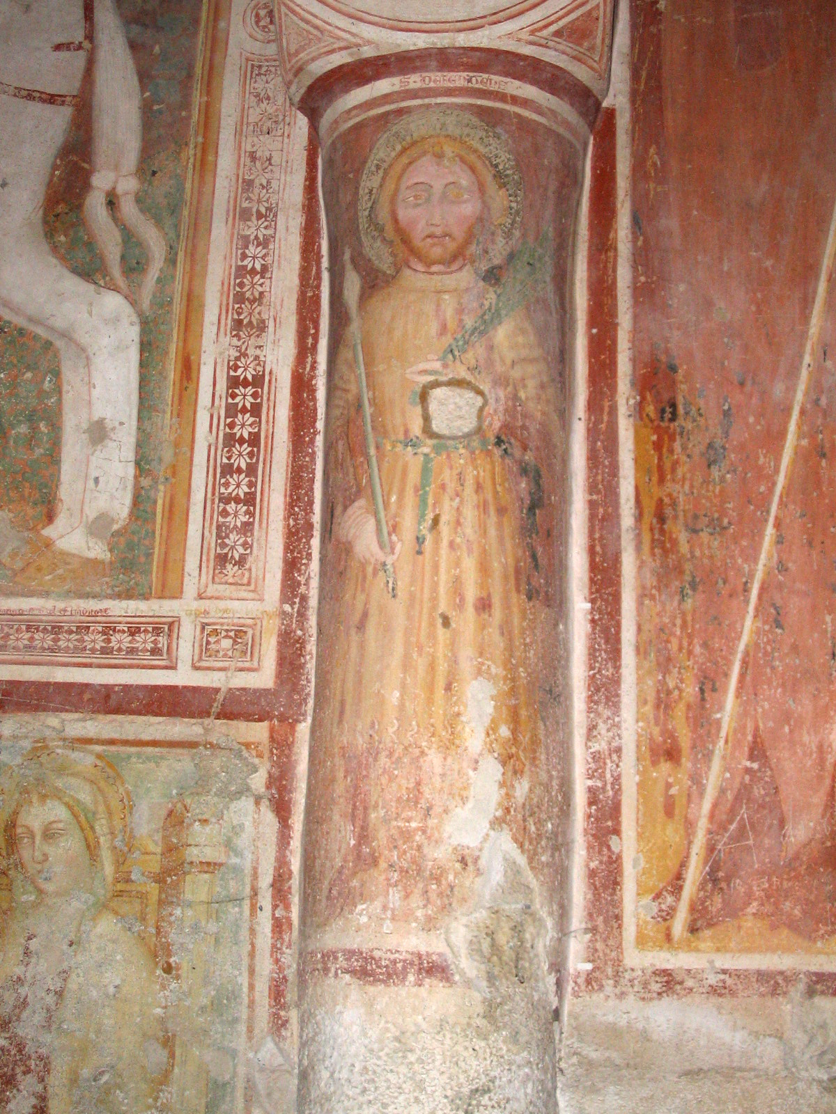 San Defendente; affresco attribuito al cosiddetto "Maestro del 1388" e datato alla fine degli anni '80 del XIV secolo. Chiesa di San Giorgio in Lemine (ad Almenno San Salvatore, Bergamo). Fotografia di Giorces.